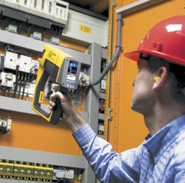 Messung an einer Elektrounterverteilung